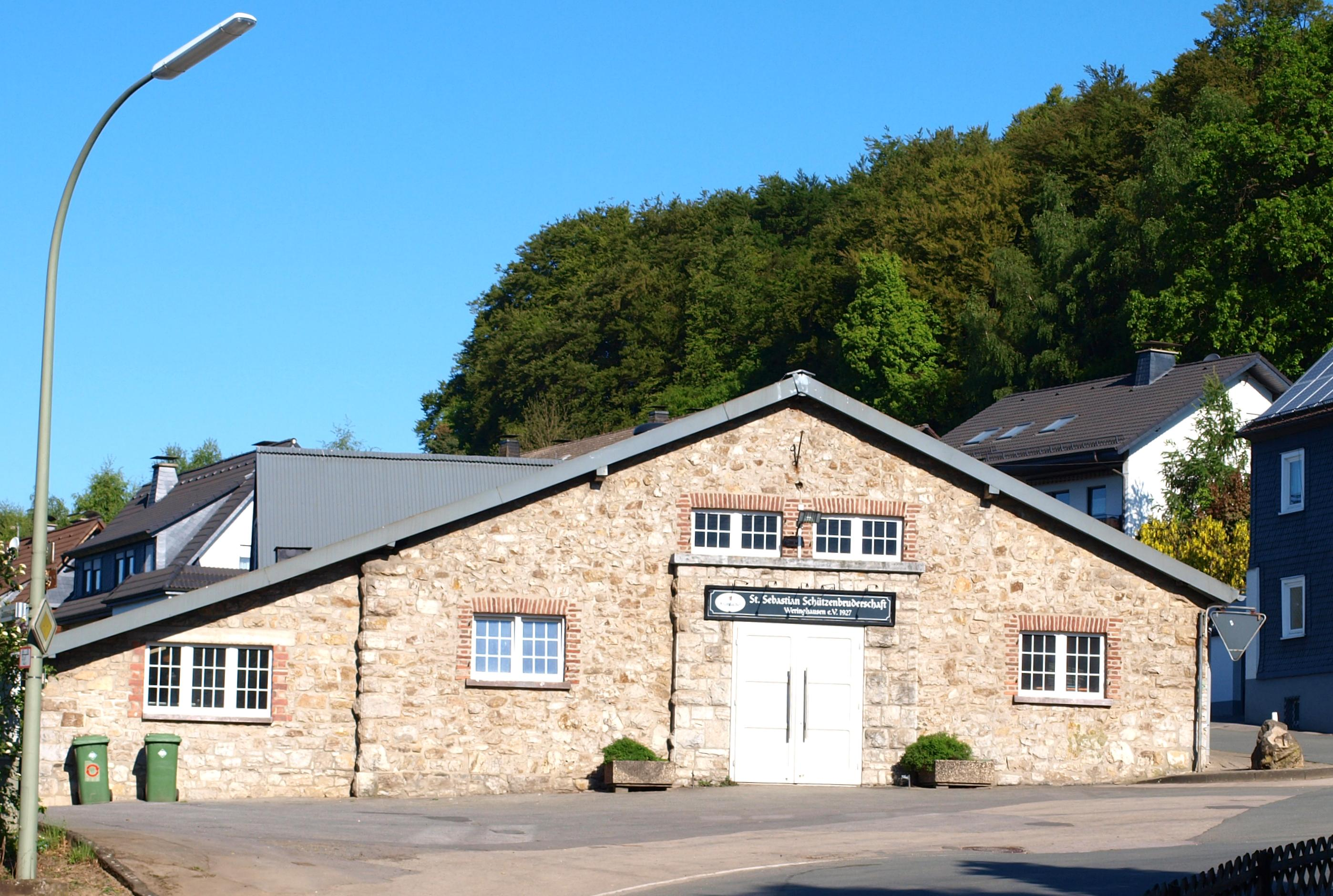 Rechts im Hintergrund das Loh.